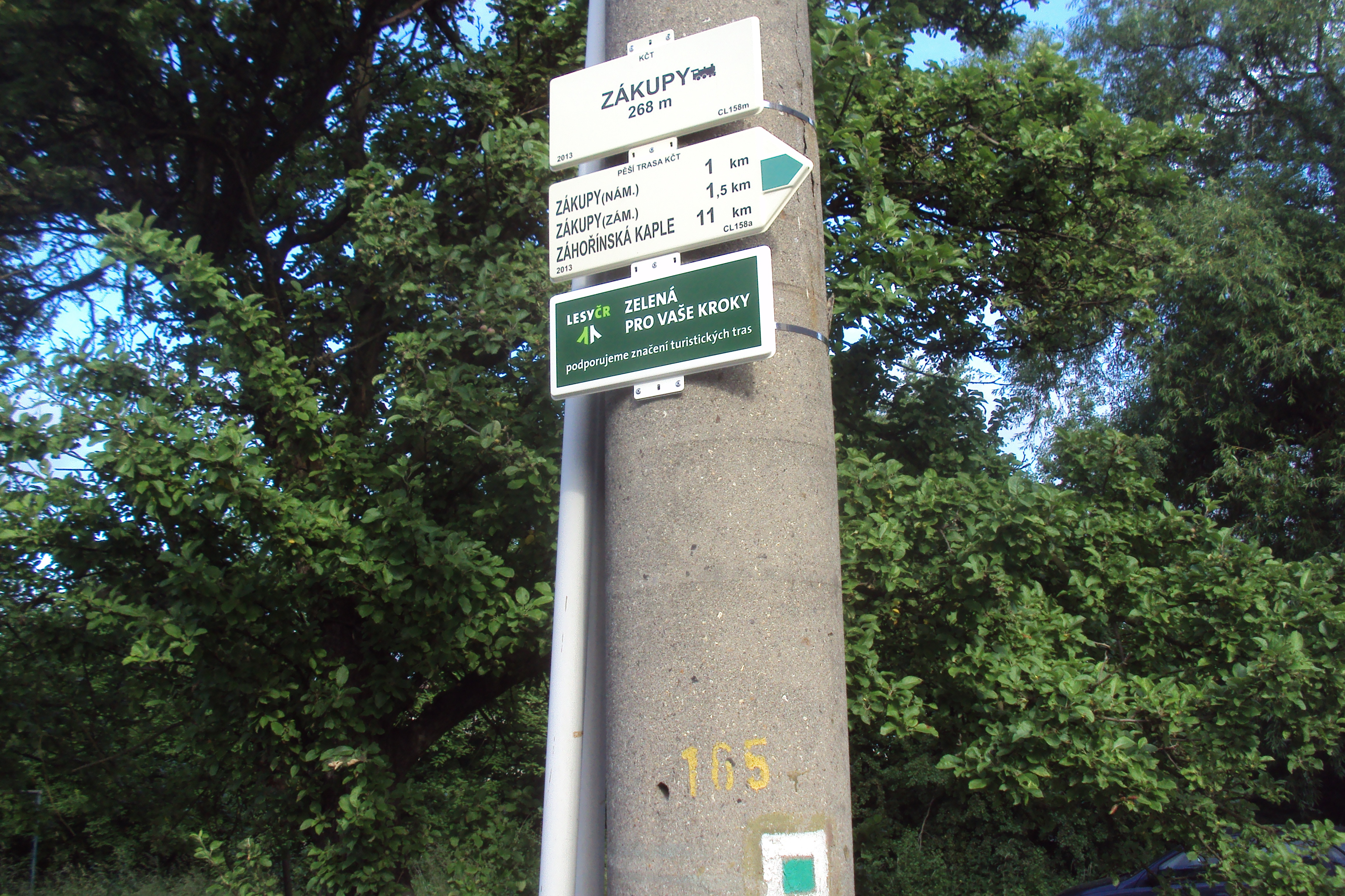 Nově instalovaný rozcestník u zákupského vlakového nádraží